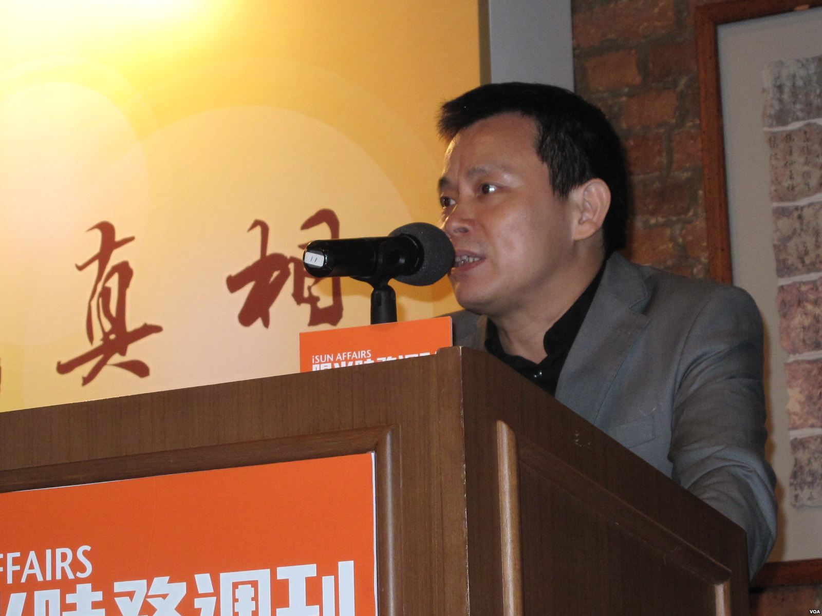 Cheng Yizhong